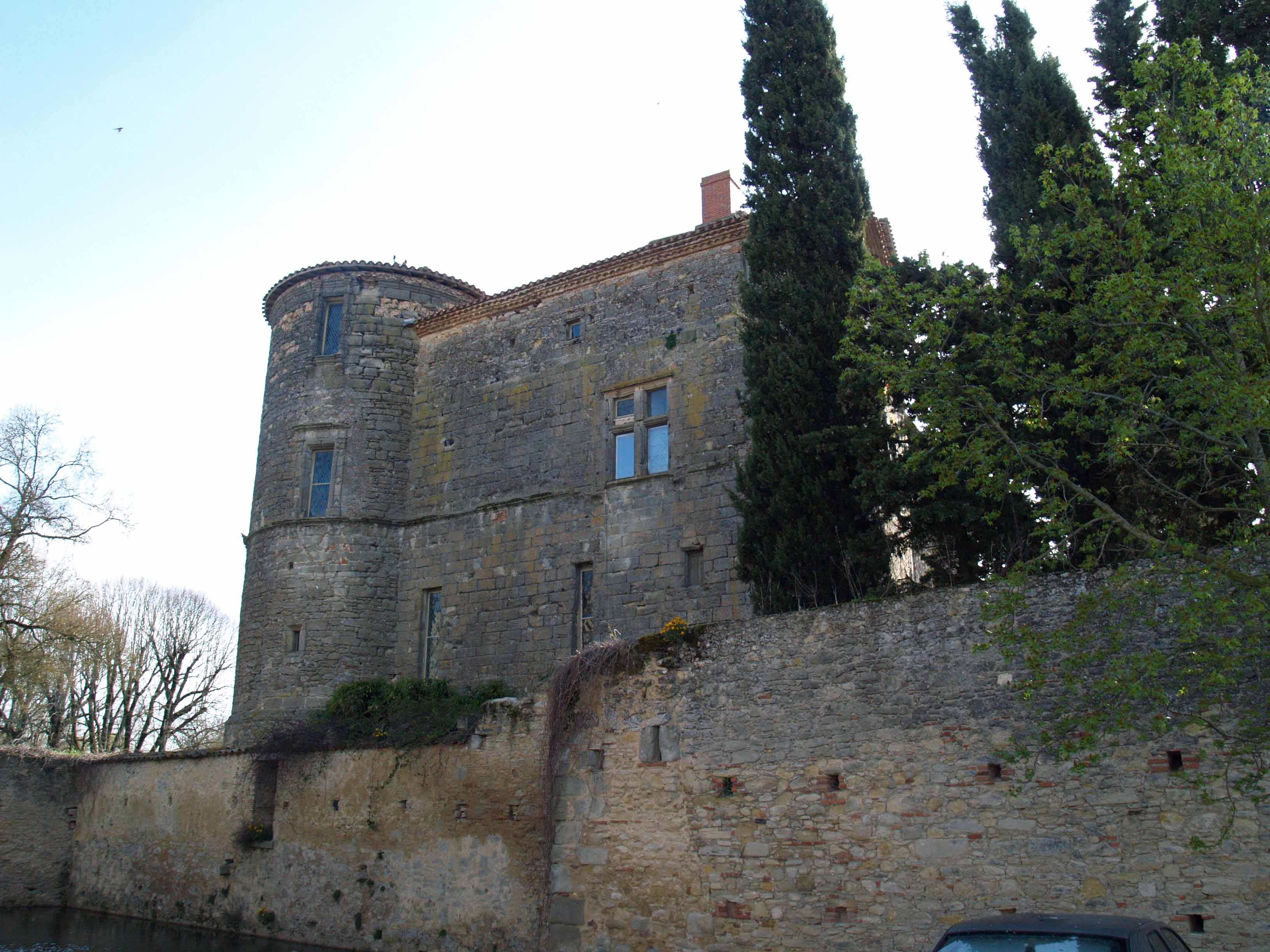 Loubens Lauragais Le chateau Photo personnelle Bertrand Bouret